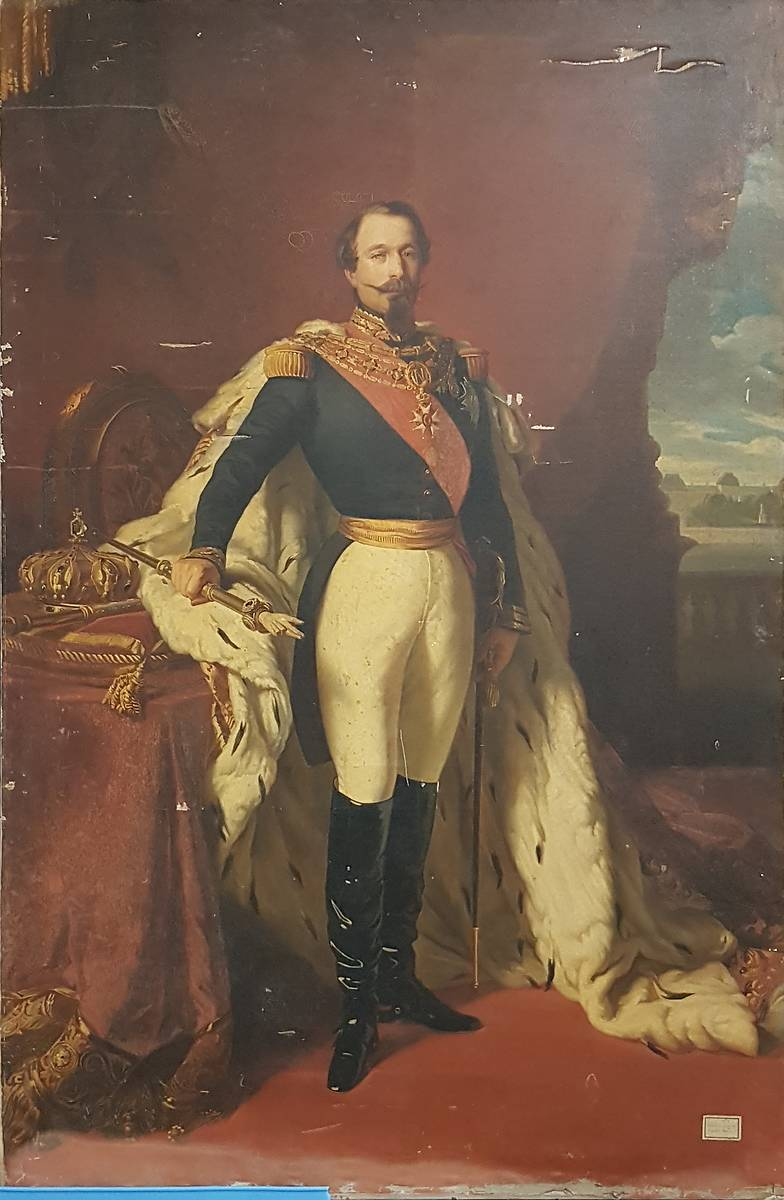 Альфред Декаен после Франца Винтерхальтера, портрет Наполеона III, 1854, Музей Конде, 242x180 см.